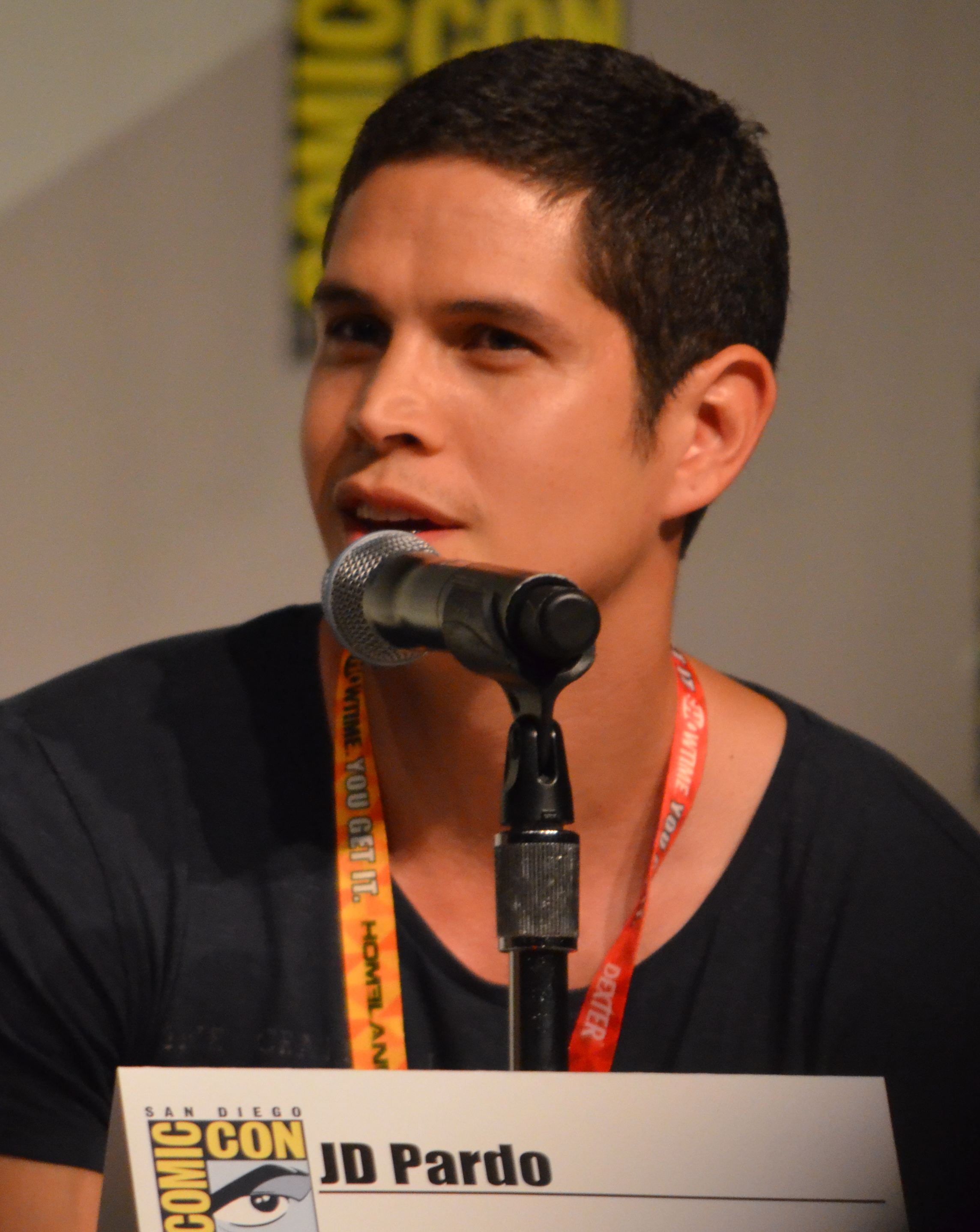 JD Pardo